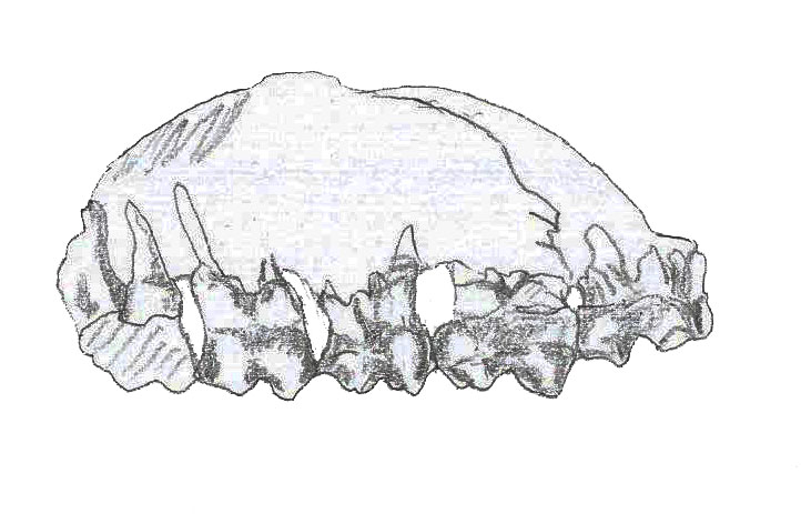 maxilla of Colombitherium